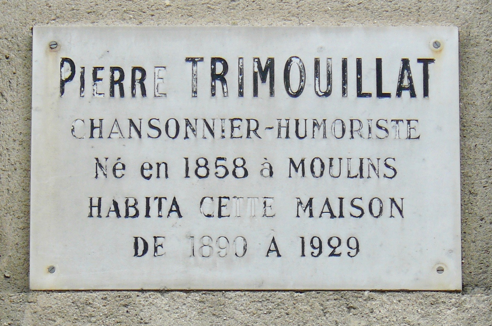 Plaque sur le n°10 de la rue Chanoinesse, Paris, 4eme arrondissement. Habitation du chansonnier Pierre Trimouillat